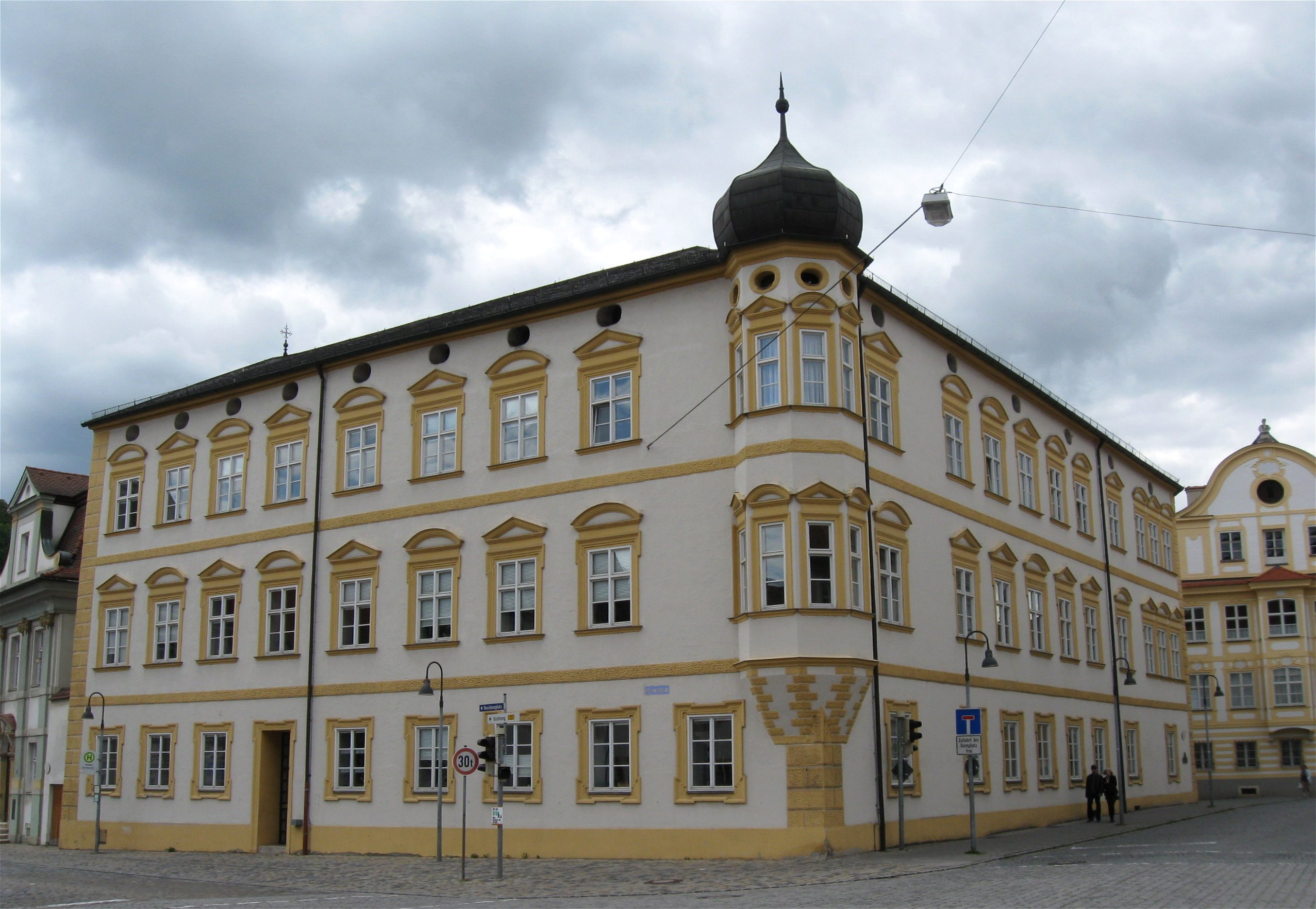 Pater-Philipp-Jeningen-Platz 6; Ehemaliger Domherrenhof Ulm, jetzt Teil der Gesamthochschule Eichstätt, dreigeschossige Vierflügelanlage mit Eckerkerturm, um 1625 erbaut, Ausgestaltung zum barocken Palais durch Giovanni Giacomo Engl 1688, Hofeinfahrt bezeichnet mit dem Jahr 1578, Umbau 1978-80 durch Karljosef Schattner zur Fachbereichs- Bibliothek Theologie der Katholische Universität. D-1-76-123-178